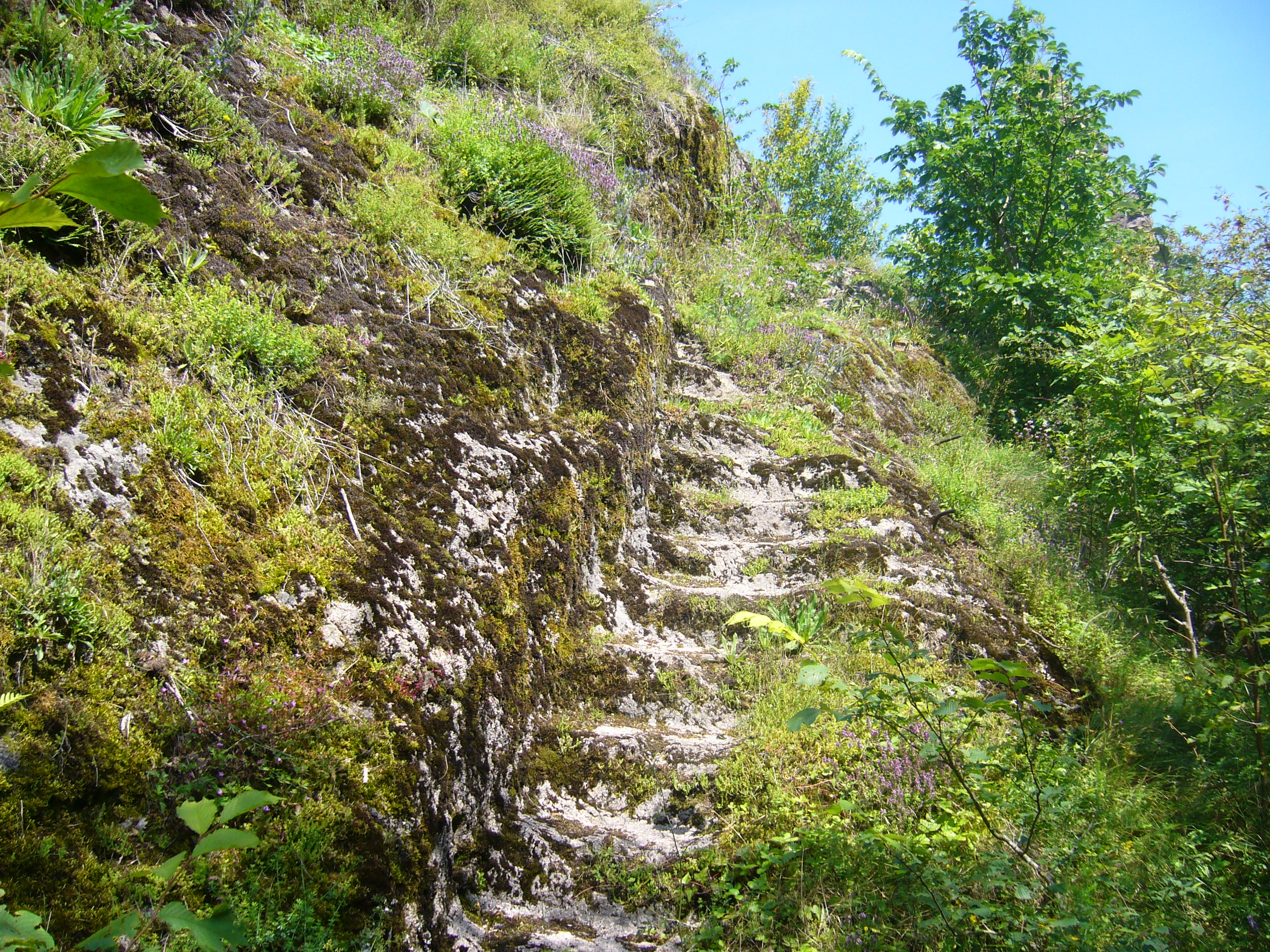 Entrée du château d'Echéry en ruine